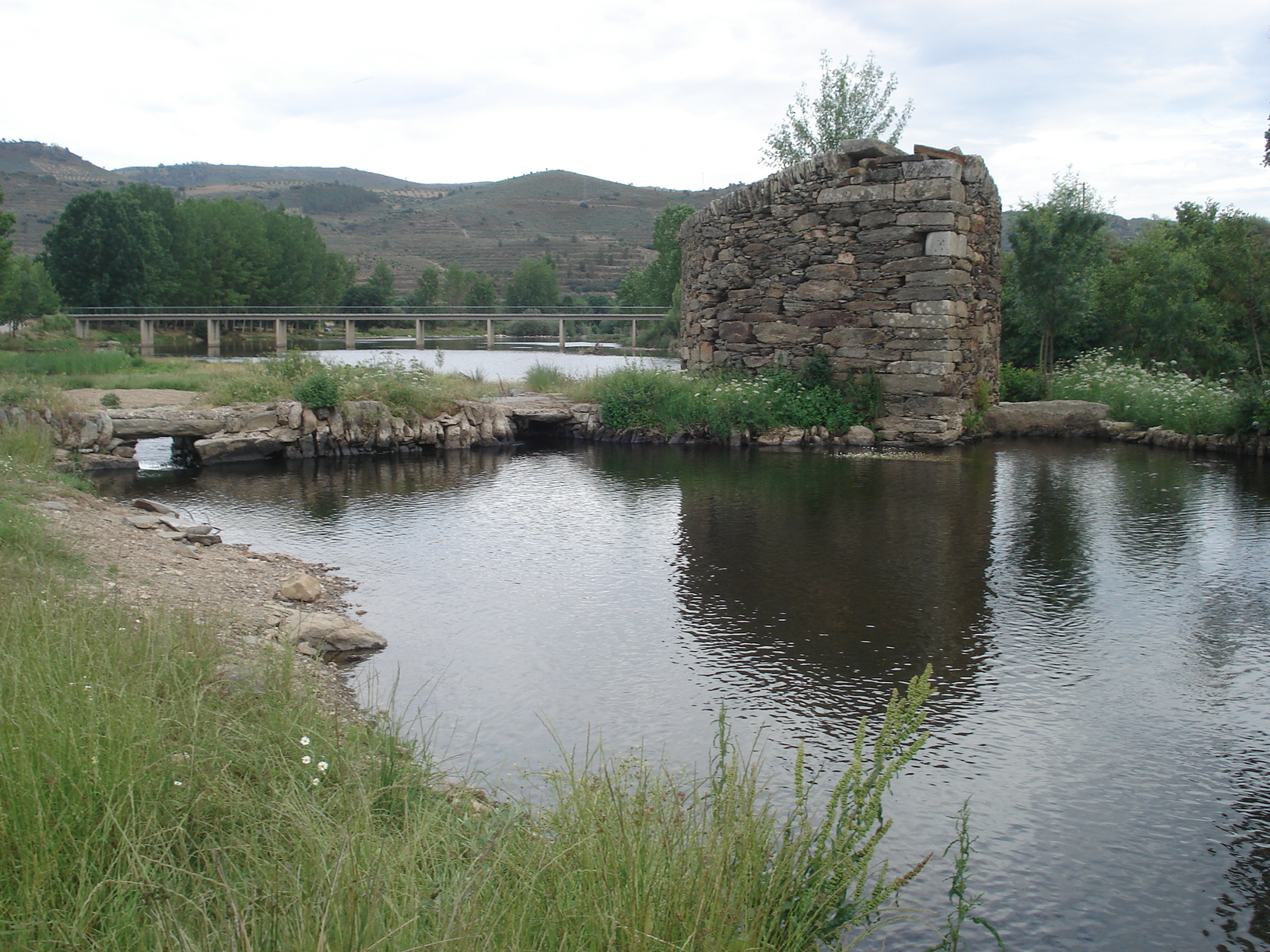 Azenha na praia fluvial de frechas